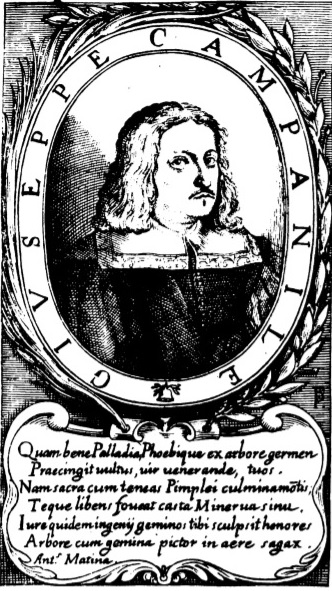 Ritratto del genealogista Giuseppe Campanile